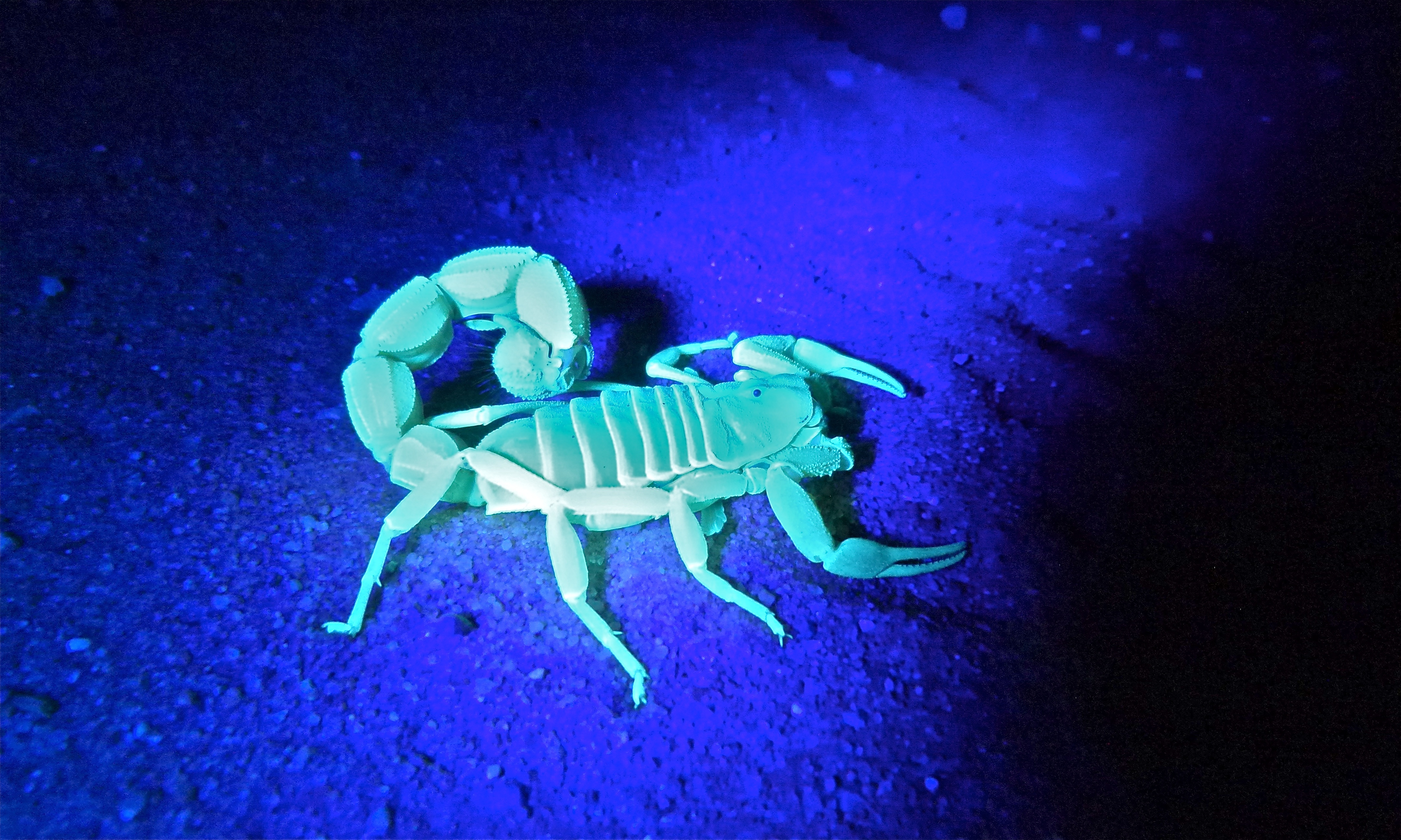 Twee Rivieren Camp, Kgalagadi Transfrontier Park, SOUTH AFRICA